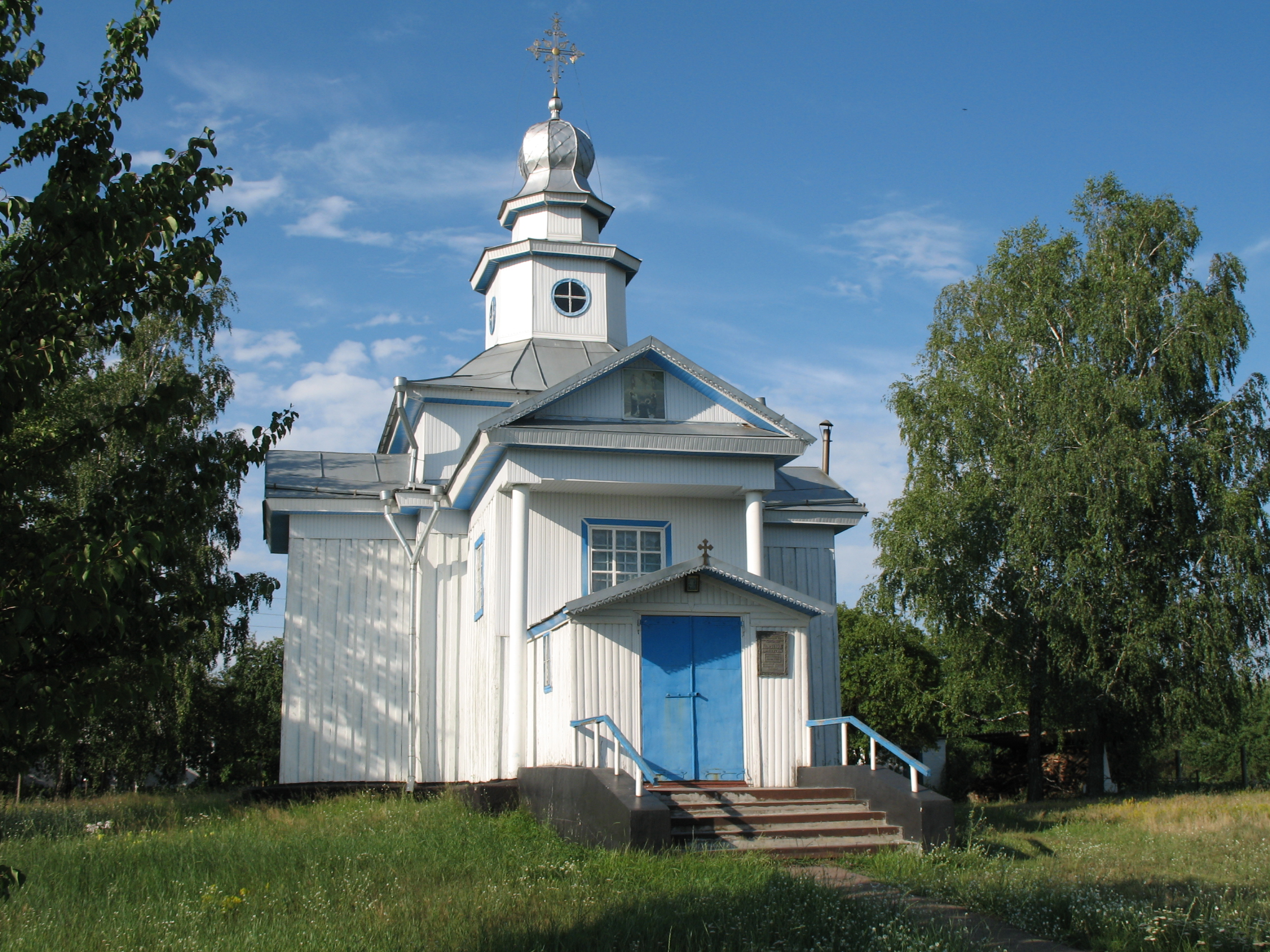 Спасо-Преображенська церква (1849 р.) у с. Сухоліси Білоцерківського району Київської області. Україна